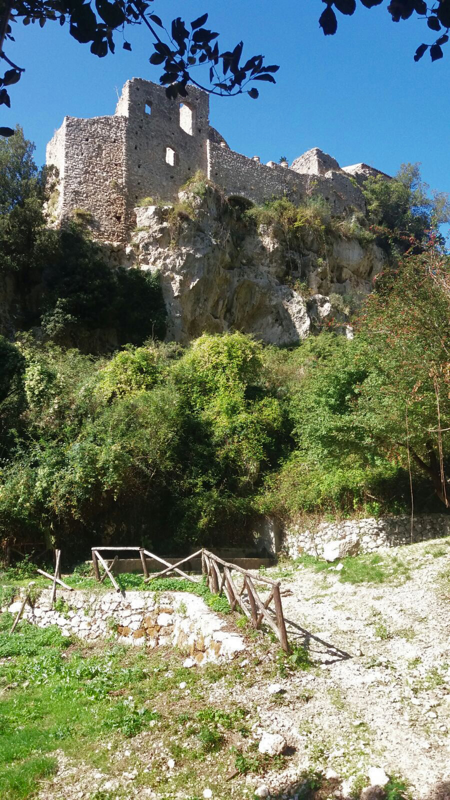 Il santuario della Madonna del Taburno a Bucciano (BN)